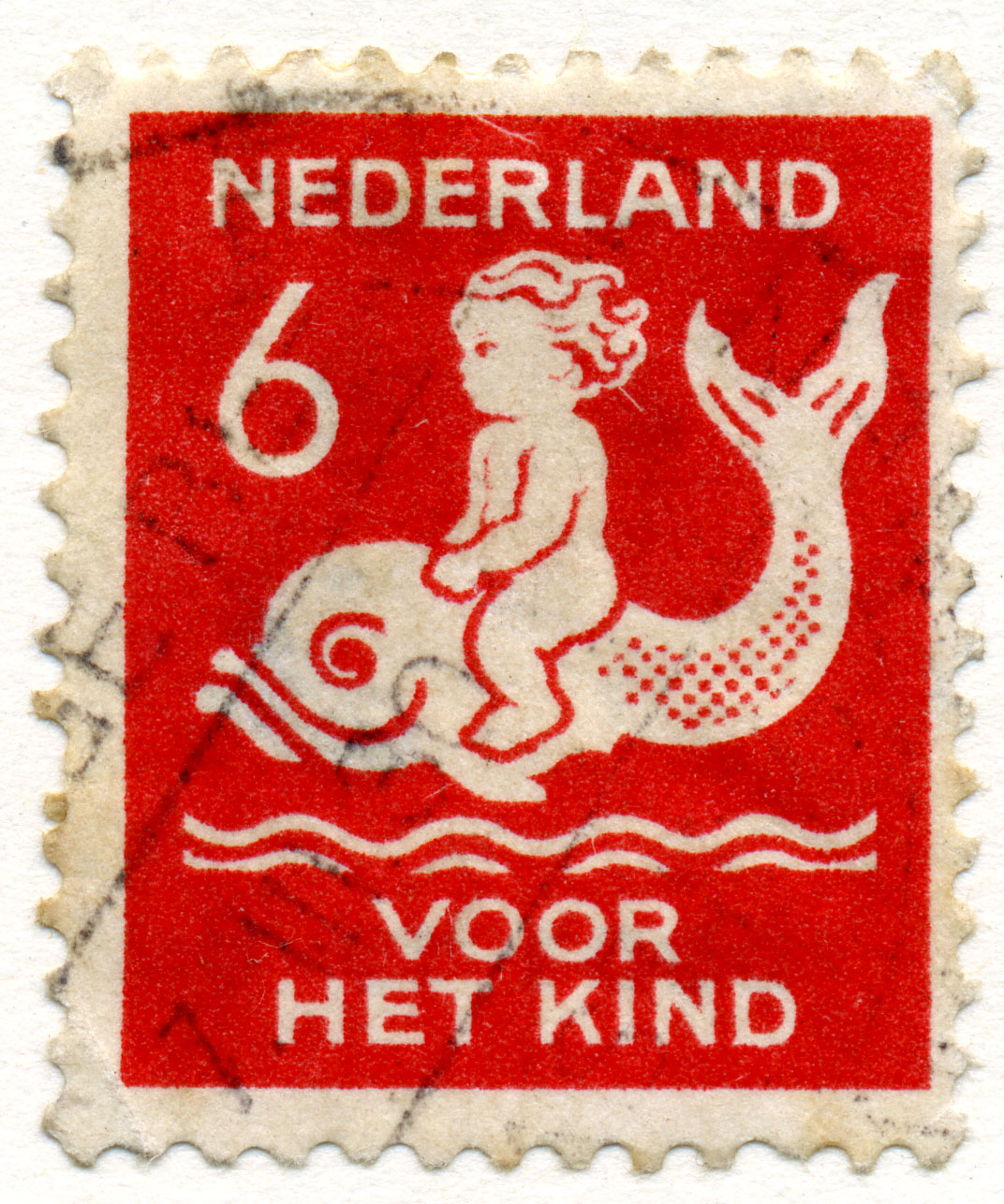 Kinderzegel 6 cent (1929). NVPH nr 227. Ontwerper Harm Kamerlingh Onnes.